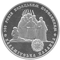 Монета Украины "500 лет казацким поселениям. Кальмиусская паланка"